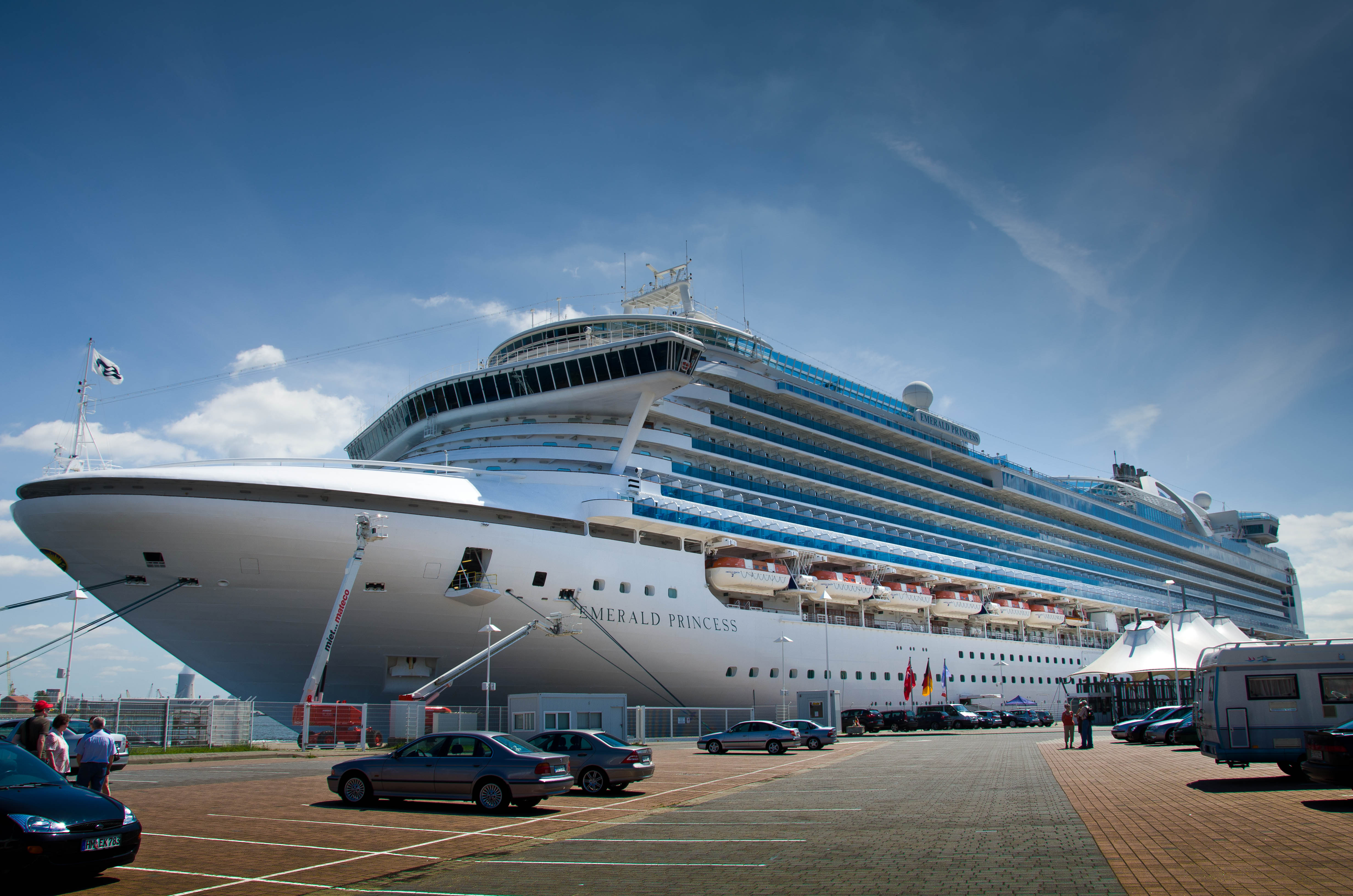 Rostock,Rügen und woanders !